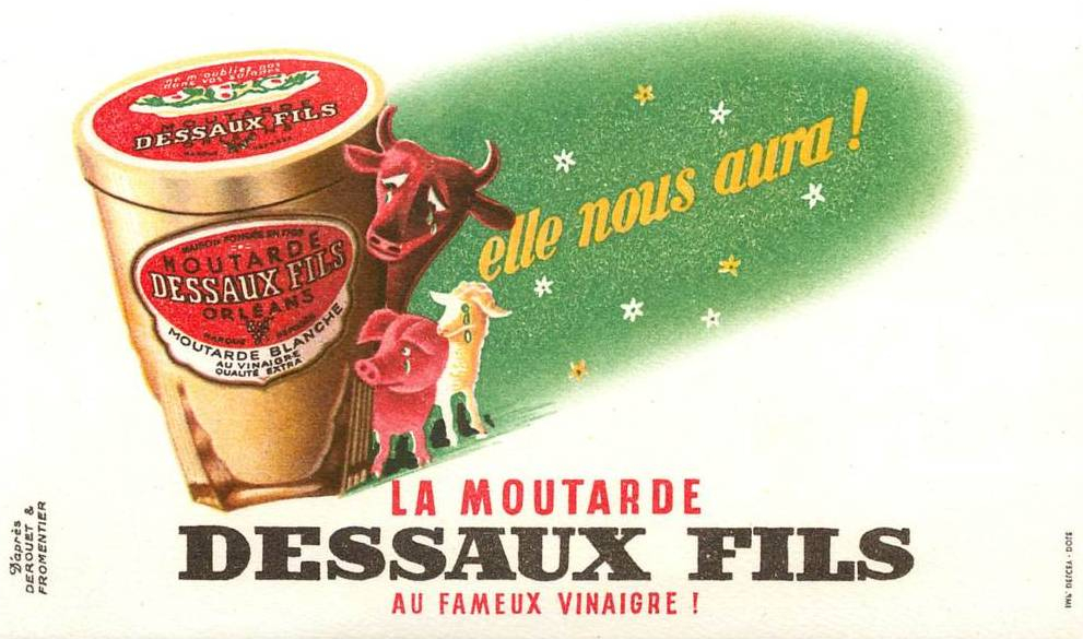 Buvard publicitaire pour la moutarde Dessaux reproduisant l'illustration d'Edgard Derouet et Paul Fromentier.